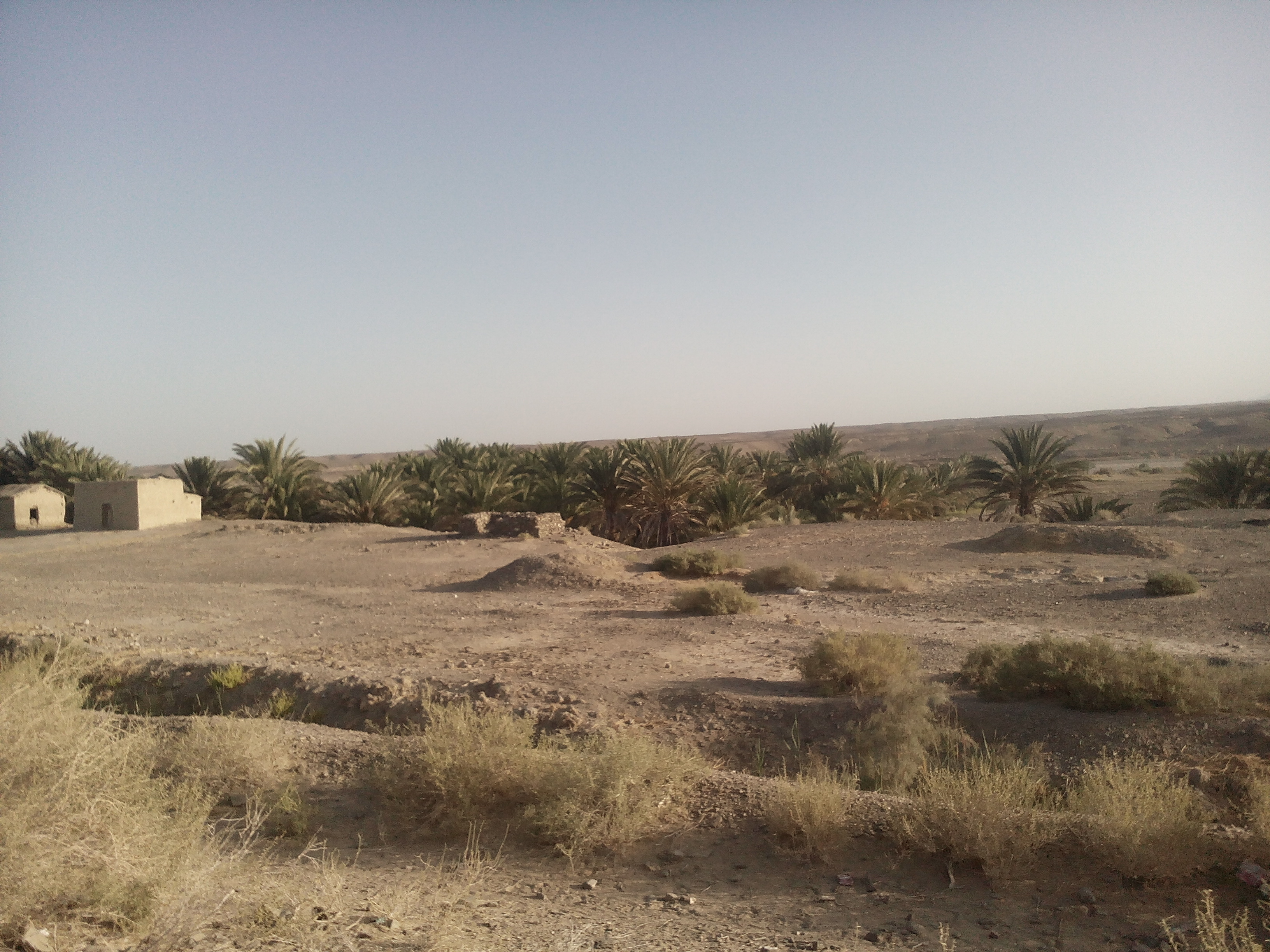 Kharan Tehsil, Pakistan